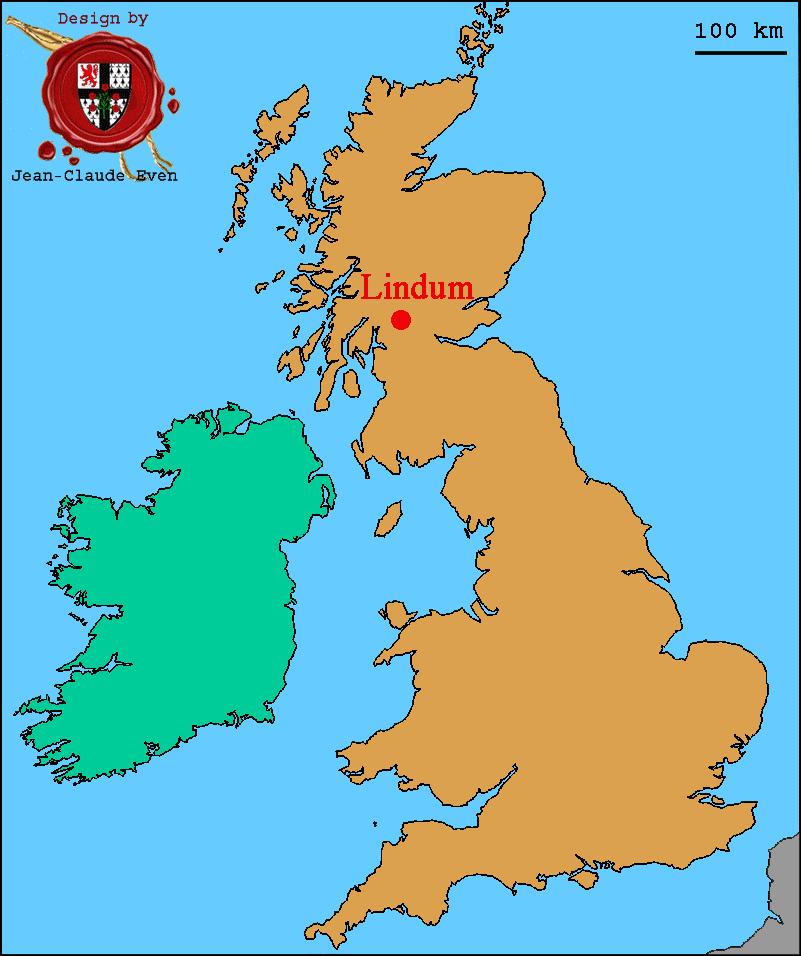 Lindum - Drumquhassle